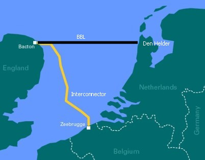 Kaart met twee gas leidingen tussen Zeebrugge (België) en Den Helder (Nederland) en Bacton (VK)